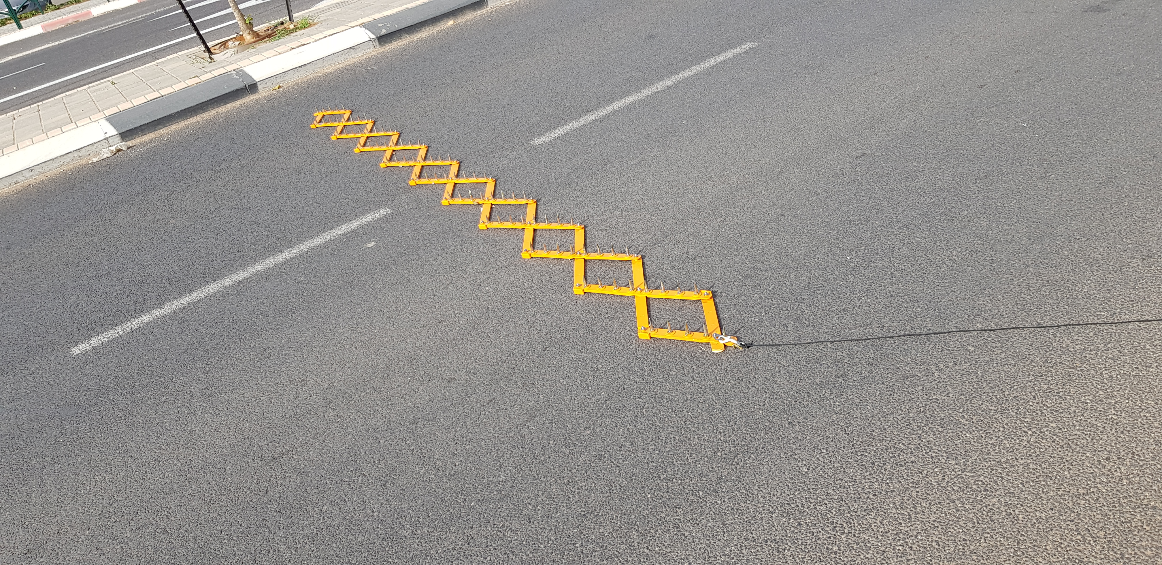 מחסום דוקרנים של משטרת ישראל